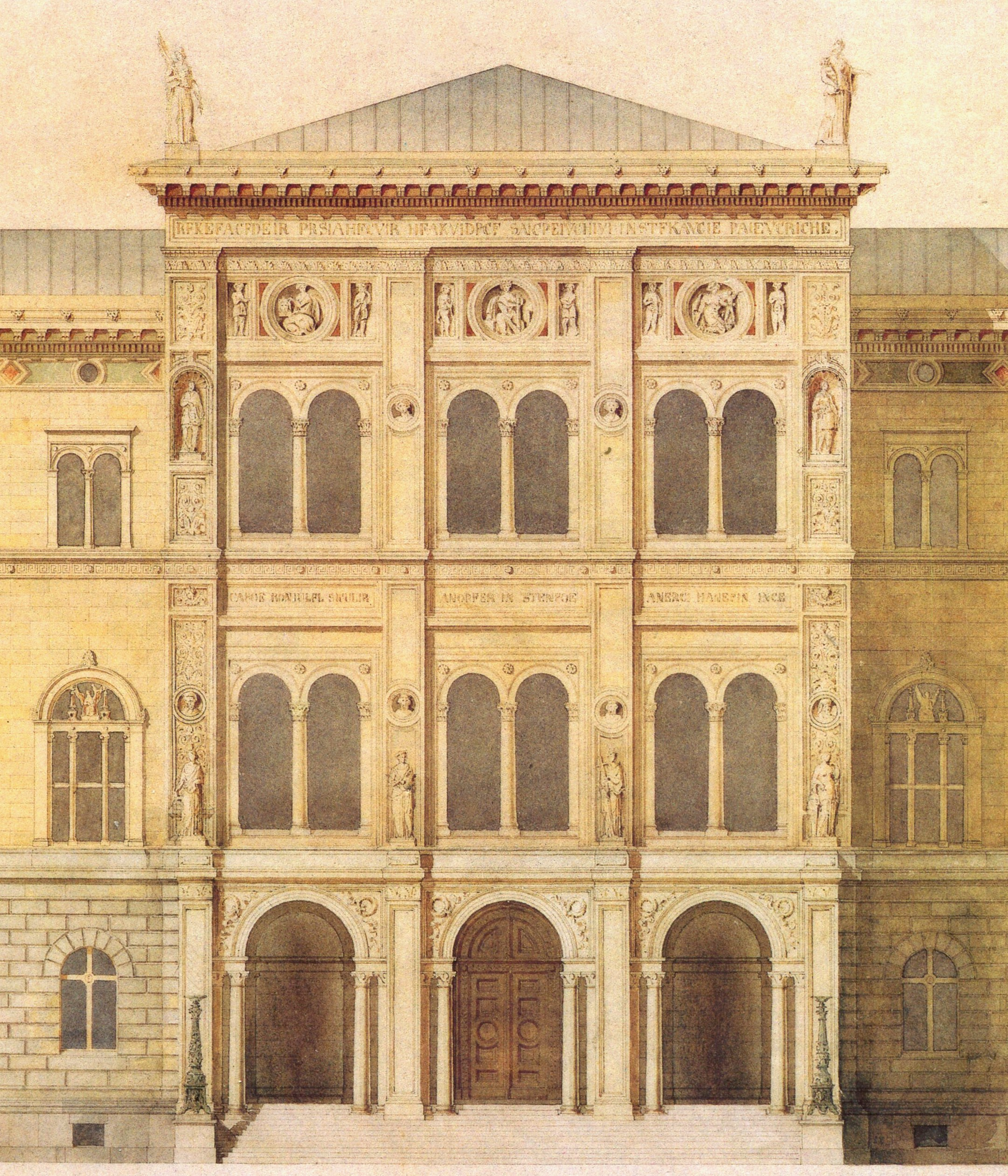 Nationalmuseum Stockholm, fasad, mittrisalit